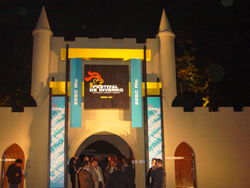 Portal de entrada do Castelo Montebello Medieval, localizado na cidade de Teresópolis/RJ.